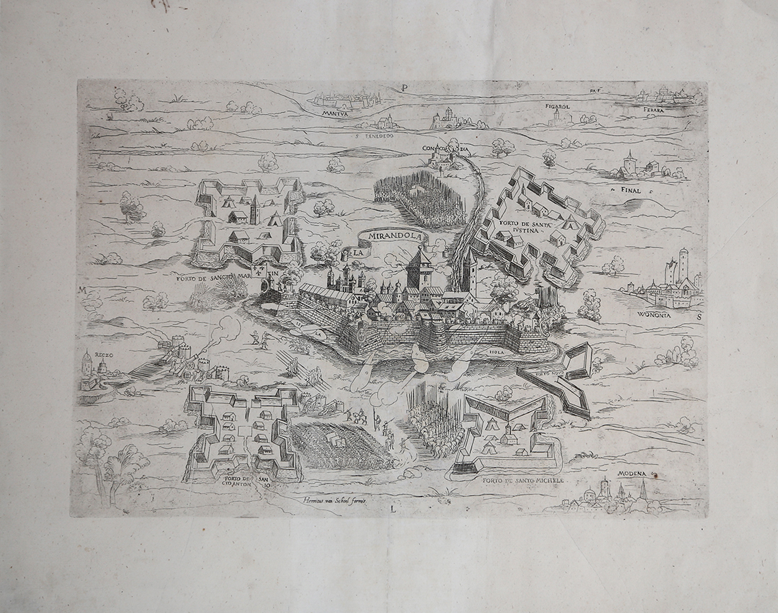 Acquaforte e bulino, 1586, firmata in lastra dall’editore. L’opera rappresenta l'assedio della Mirandola del 1551